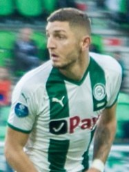 Voetballer Julian "Jeff" Chabot in een wedstrijd van FC Groningen tegen FC Twente